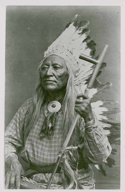 Washakie, a Shoshoni chief